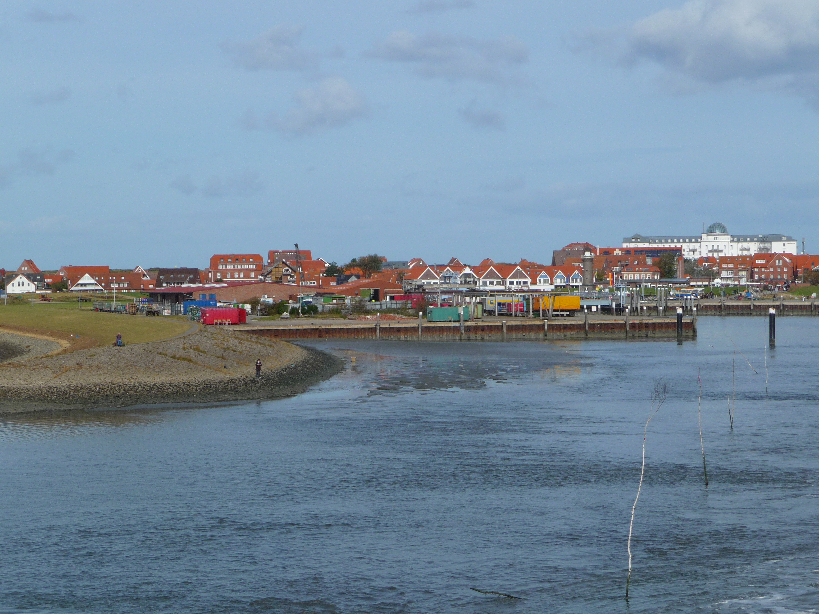 Blick von der Fähre auf den Hafen und den Hauptort der niedersächsischen Nordseeinsel Juist (Deutschland)